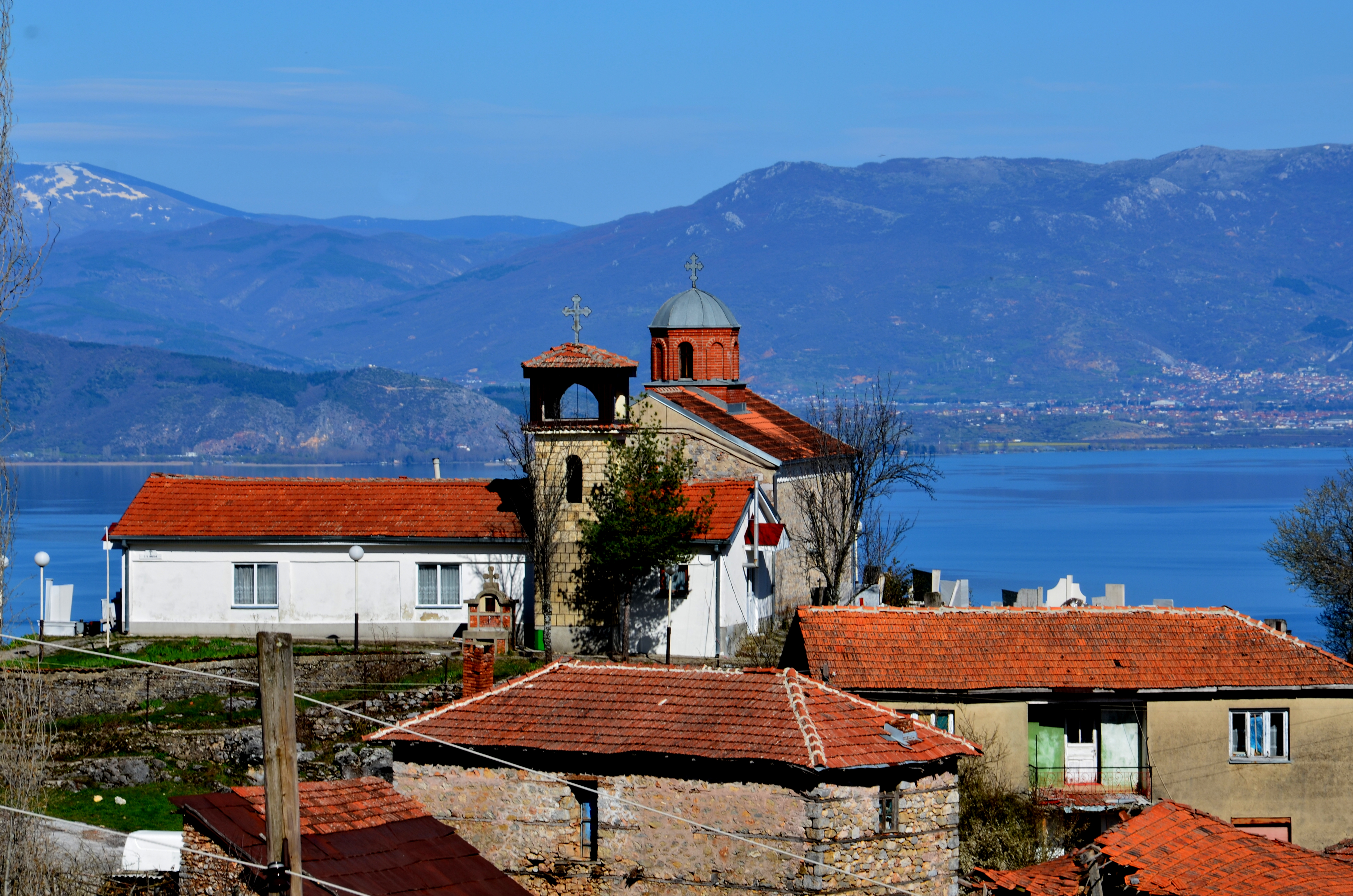 Свети Никола